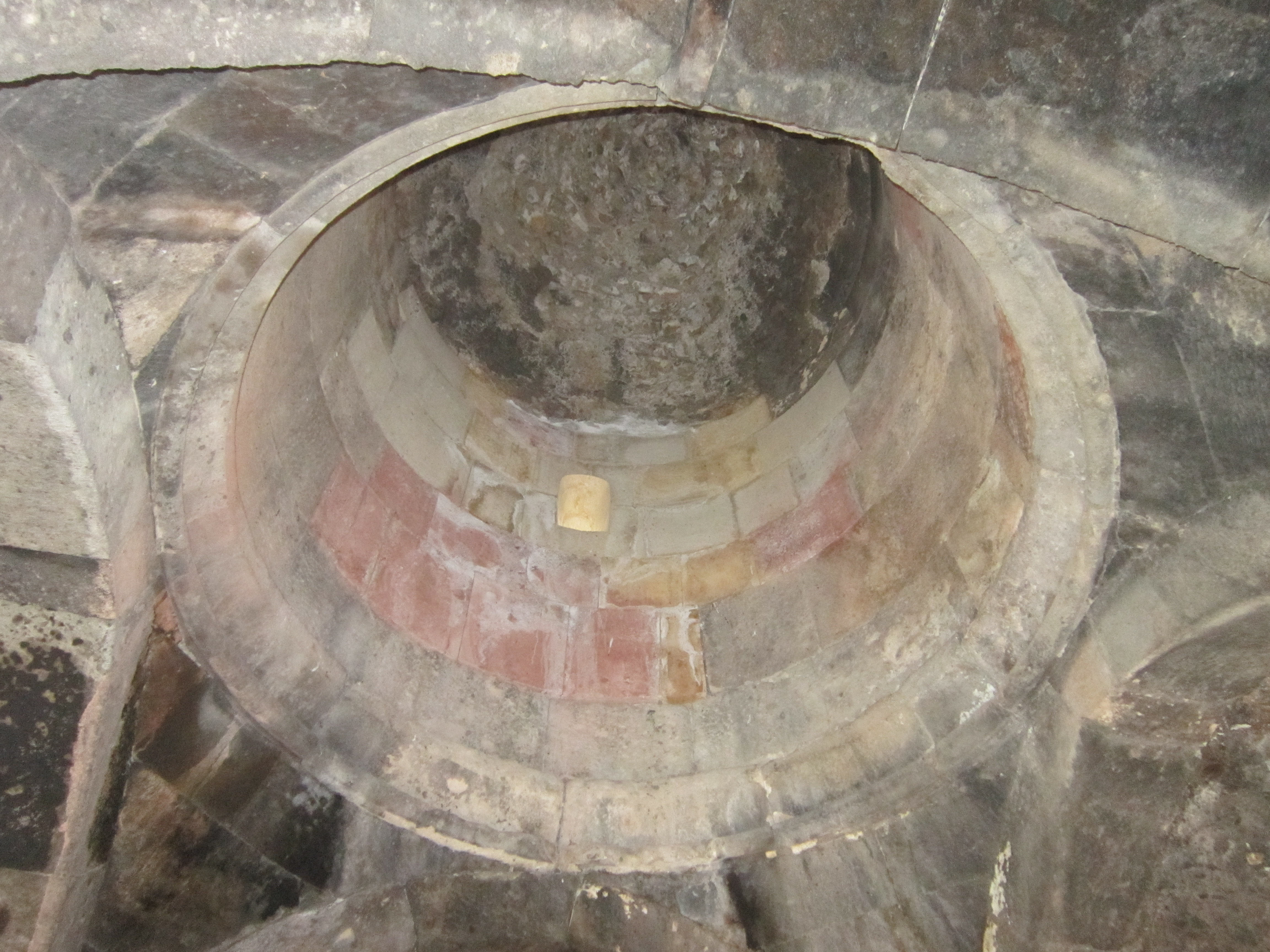 Վանական համալիր Հնեվանք 57/19